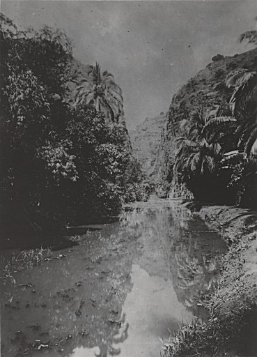 Le Bernica — Saint-Paul, Réunion